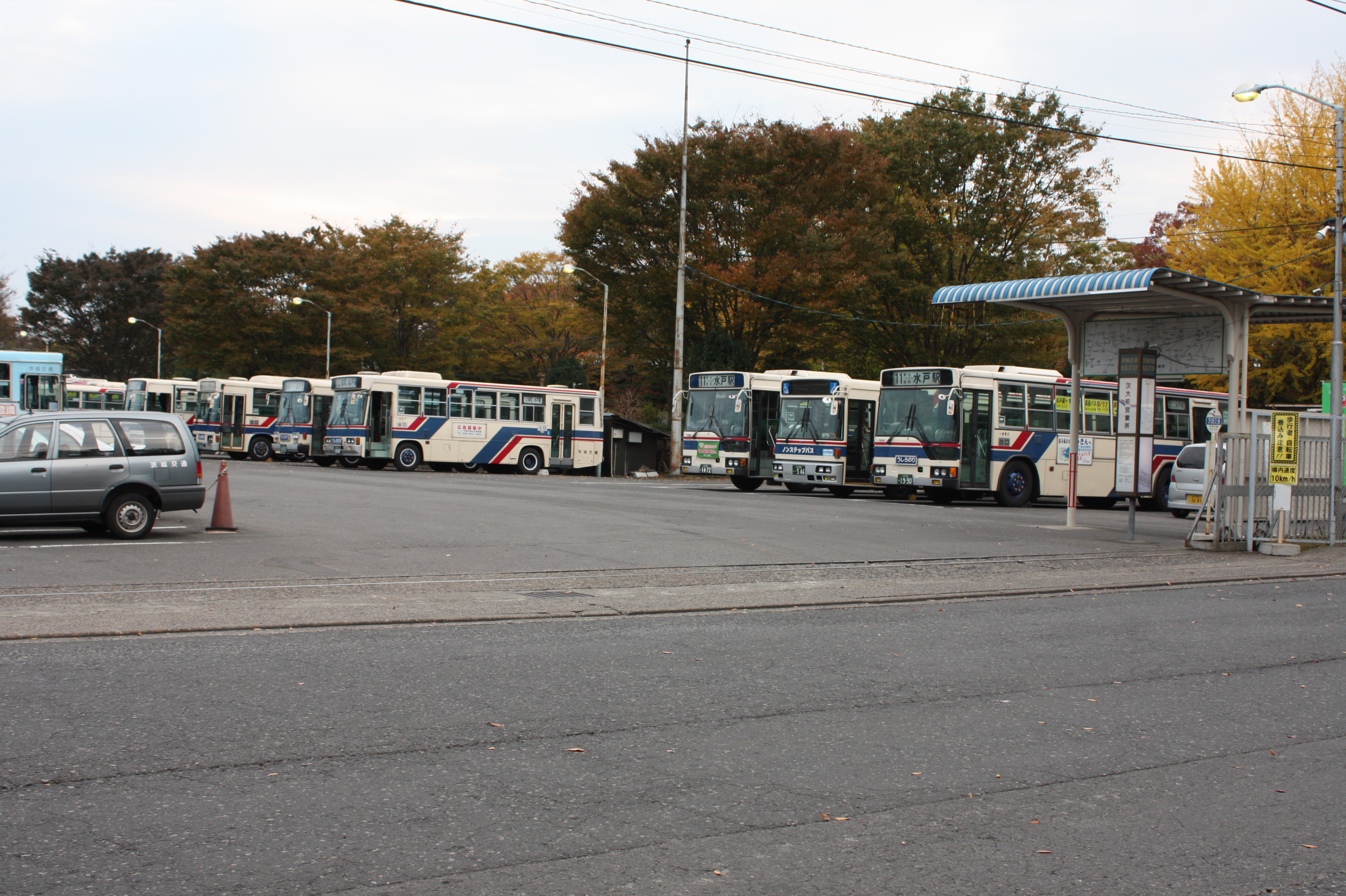 茨城交通茨大前営業所（敷地外から撮影）